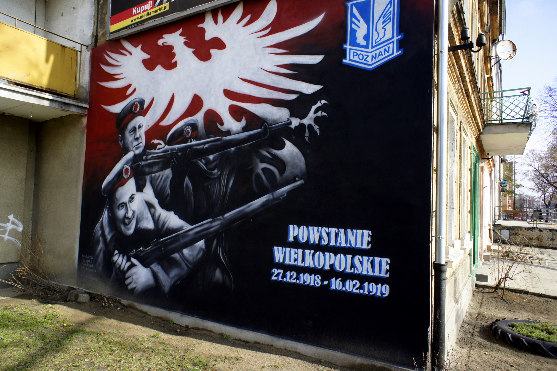 Ostrów Wlkp. Mural na jednej z kamienic przy ul. Kościuszki. ( projekt - Piotr Zydorowicz, wykonanie - Paweł Jabłoński )